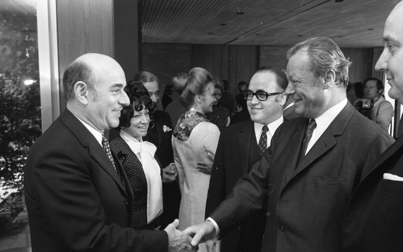 Bundeskanzler Willy Brandt empfängt Filmschauspieler Information added by Wikimedia users.Ergänzung: Willy Brandt schüttelt die Hand von Filmproduzent Artur Brauner. Ergänzung zu Abgebildete Personen: Artur Brauner, Filmproduzent, Polen, Bundesrepublik Deutschland (GND 118514695)